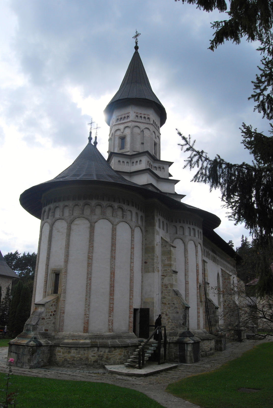 Mănăstirea Bistriţa (judeţul Neamţ)